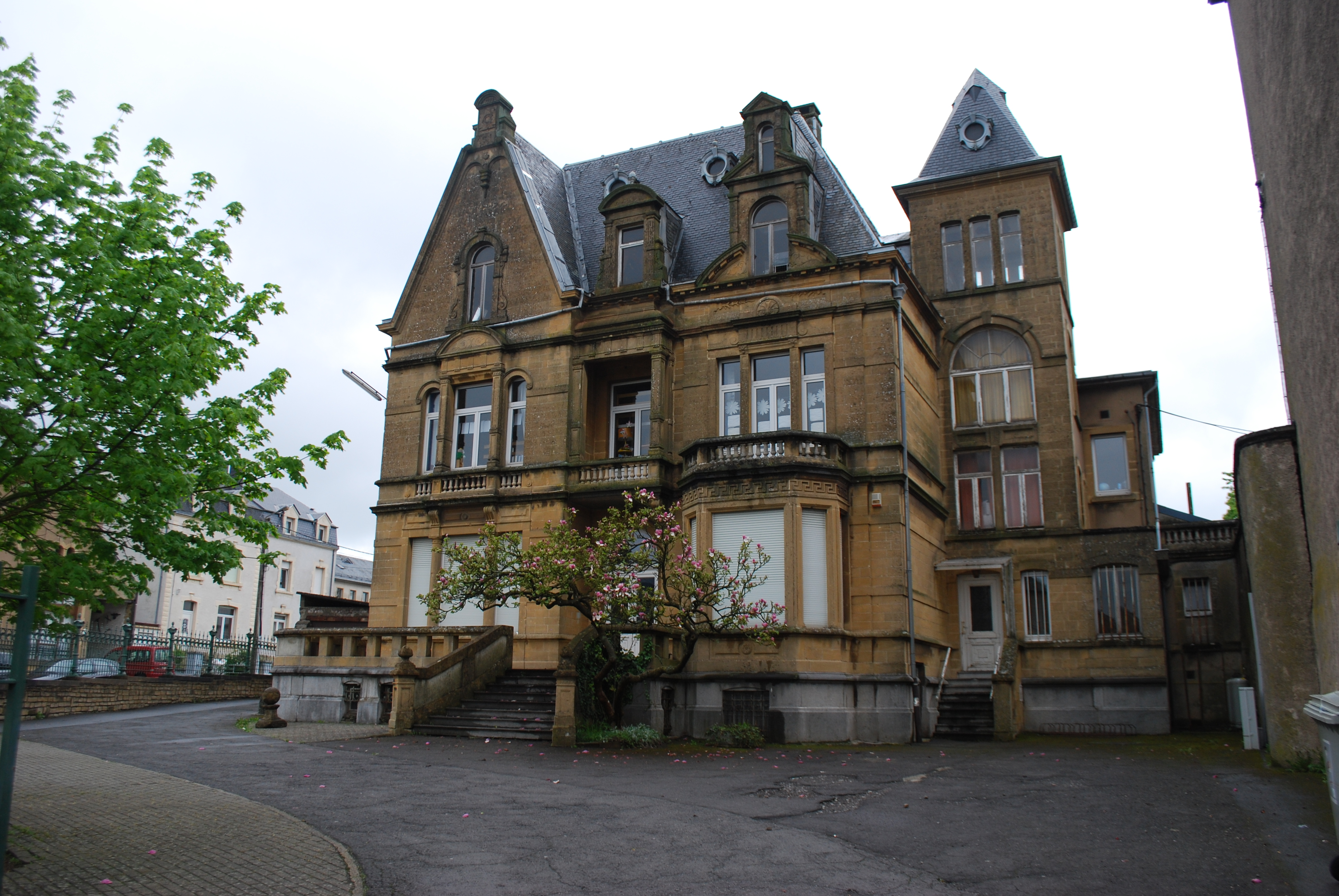 Vue d'hôtel de maître à Halanzy, reconverti en école du réseau libre.